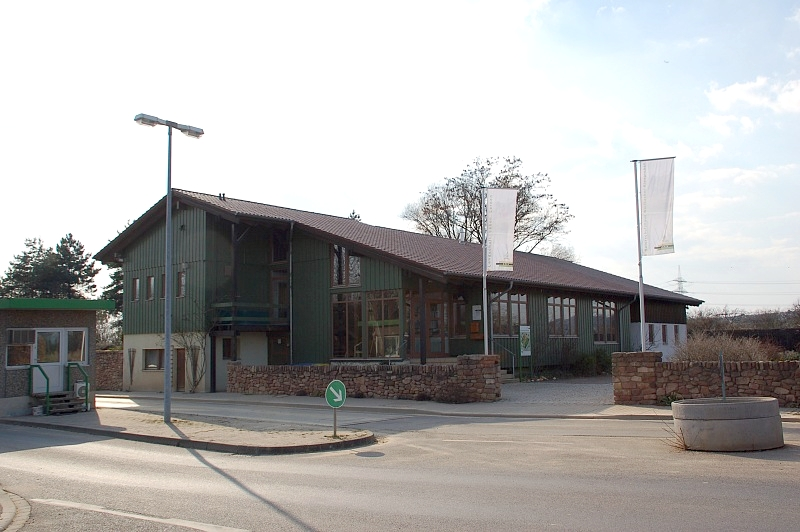 Weilbach, Naturschutzzentrum Weilbacher Kiesgruben, Nassau, Hesse, Hessen, Germany, Deutschland